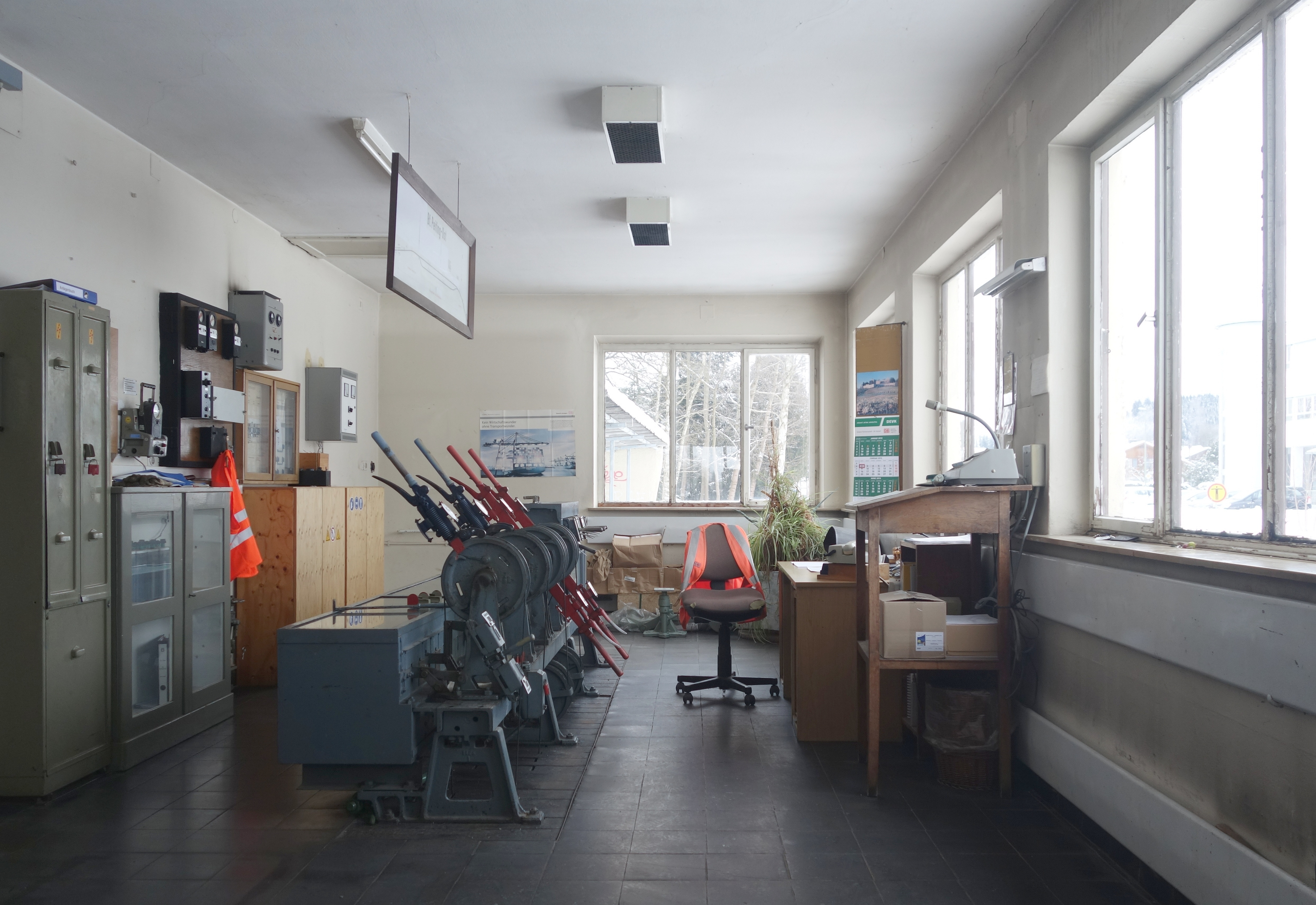 Bahnhof Peiting Ost, Empfangsgebäude, Blick in den Betriebsraum mit Stellwerk